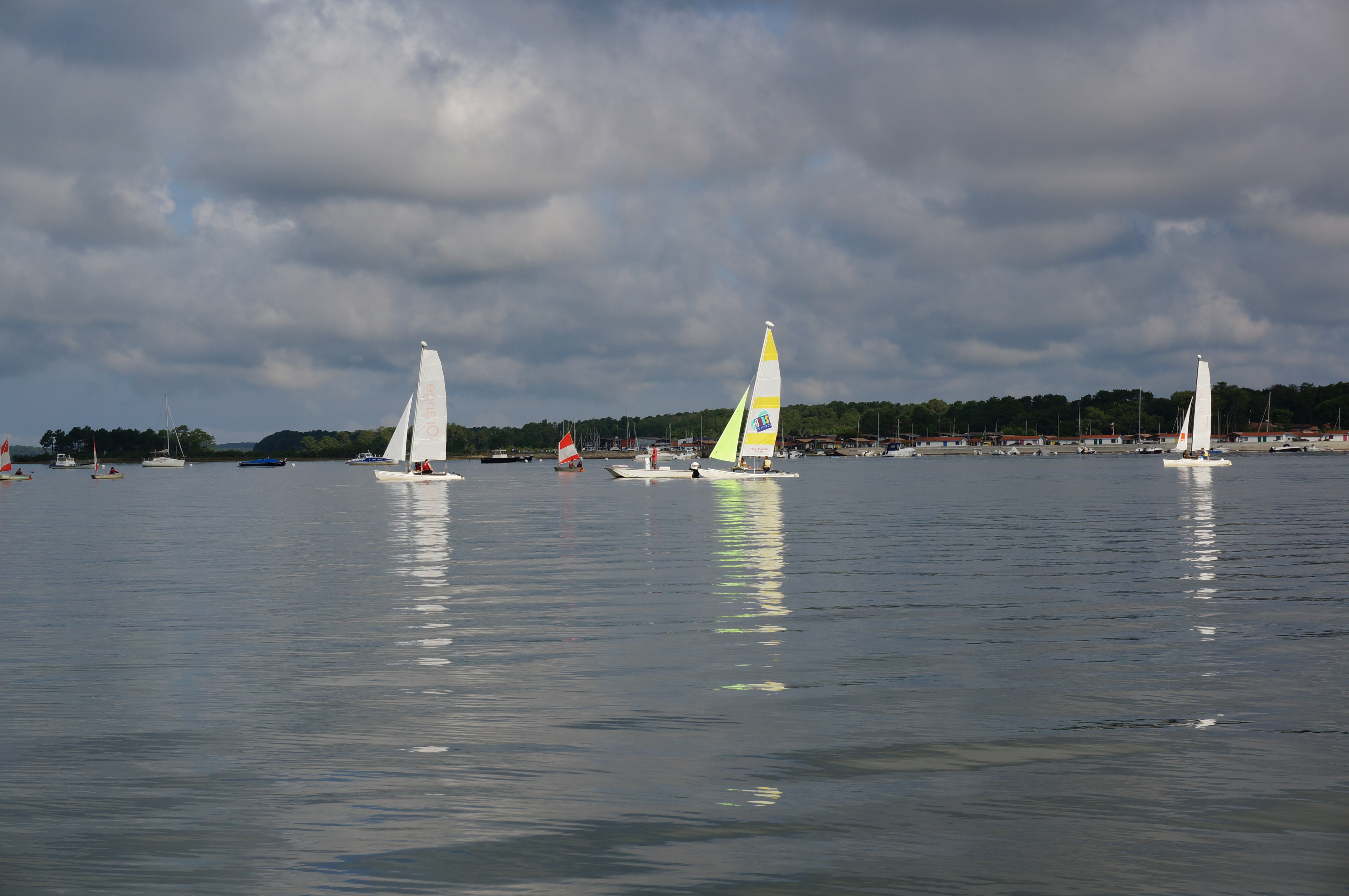 Coques du centre de voile d'Andernos (Gironde, France).